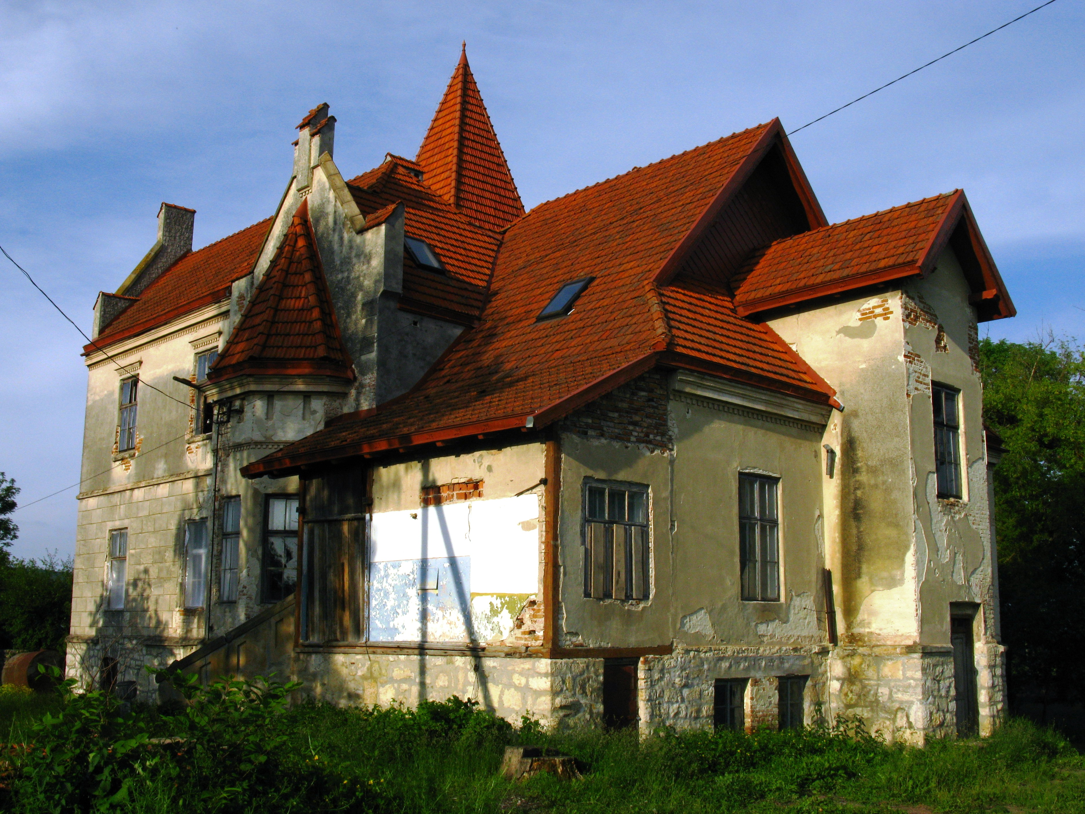 Житловий будинок(мур.), Личківці